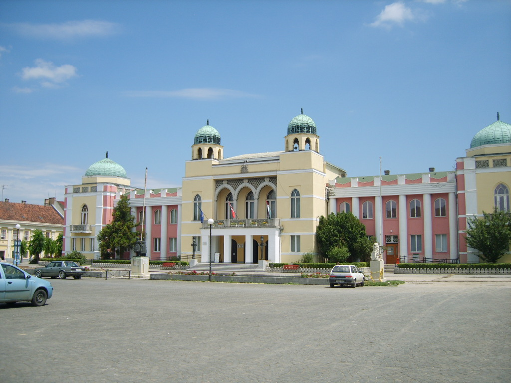 Városháza Mohács - City hall in Mohács